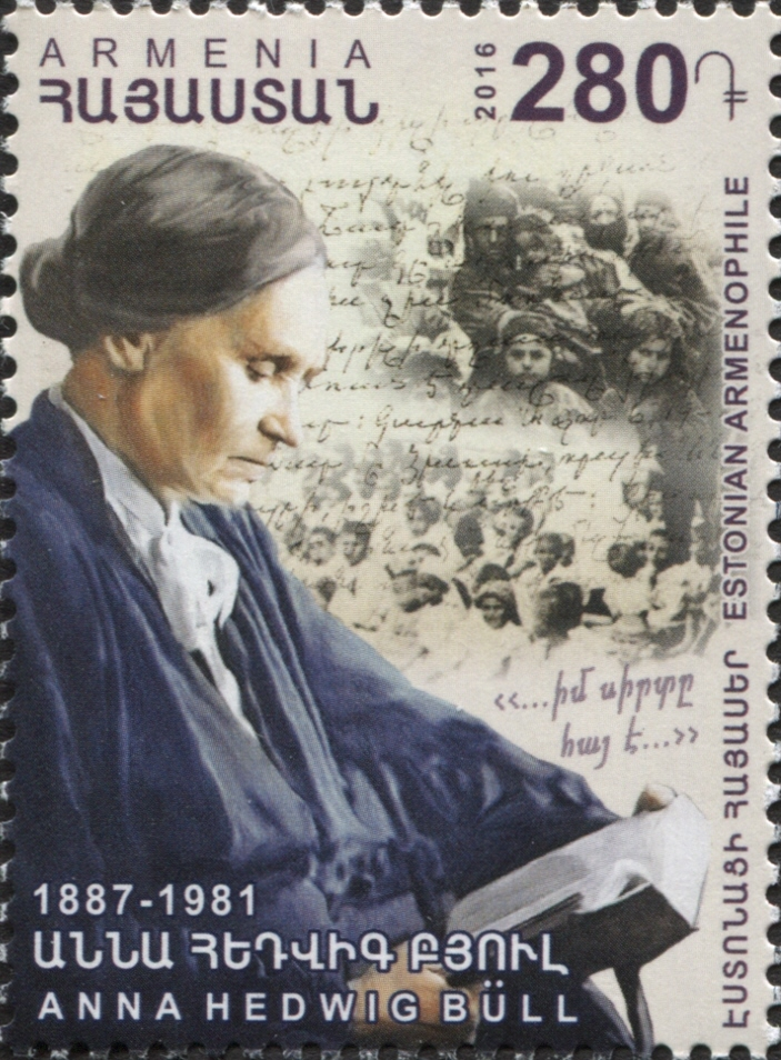 Missionaries - Anna Hedvig Büll